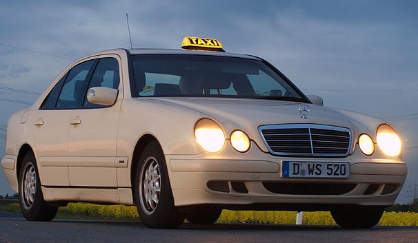 Der Mercedes W210 Diesel